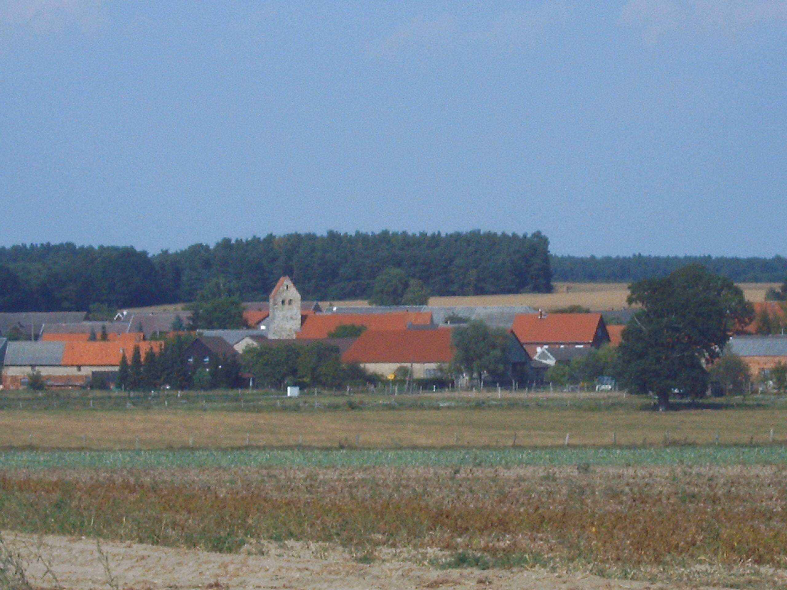 Schwiesau, Blick von Süden